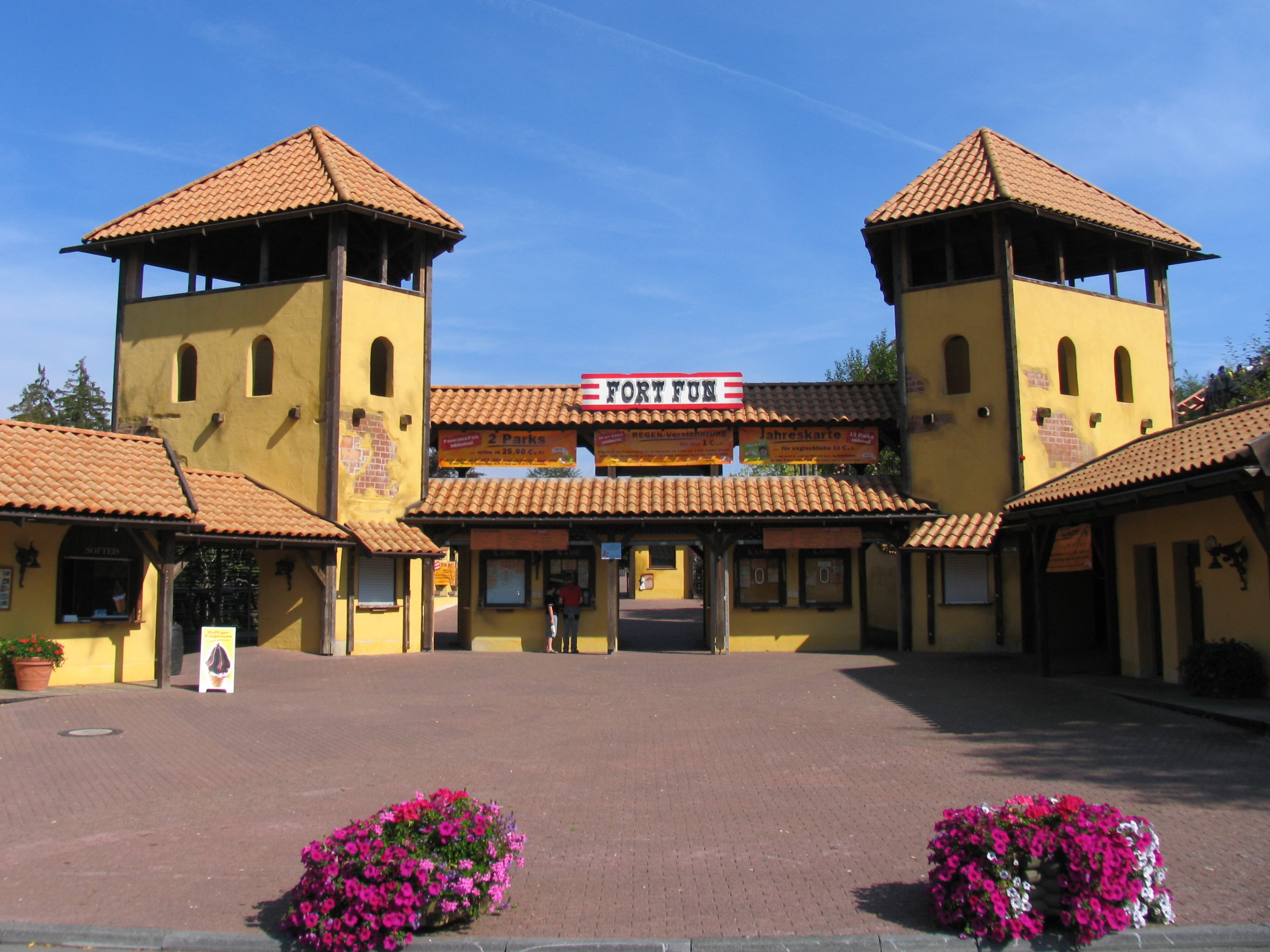 Entrance of Fort Fun Abenteuerland